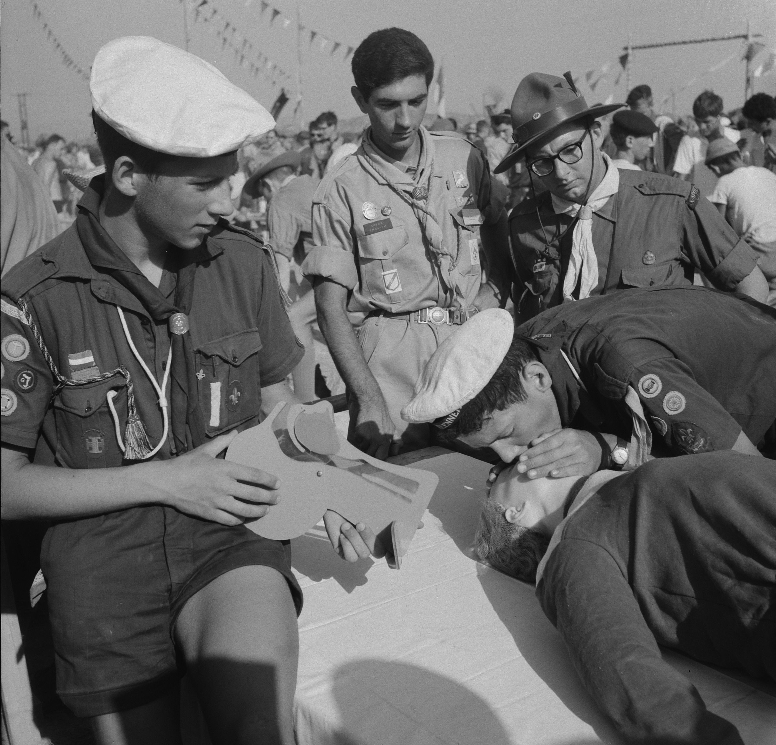 Jamboree 1963 te Marathon Griekenland. Nederlandse zeeverkenners met mond-op-mond beademing. Datum 12 augustus 1963